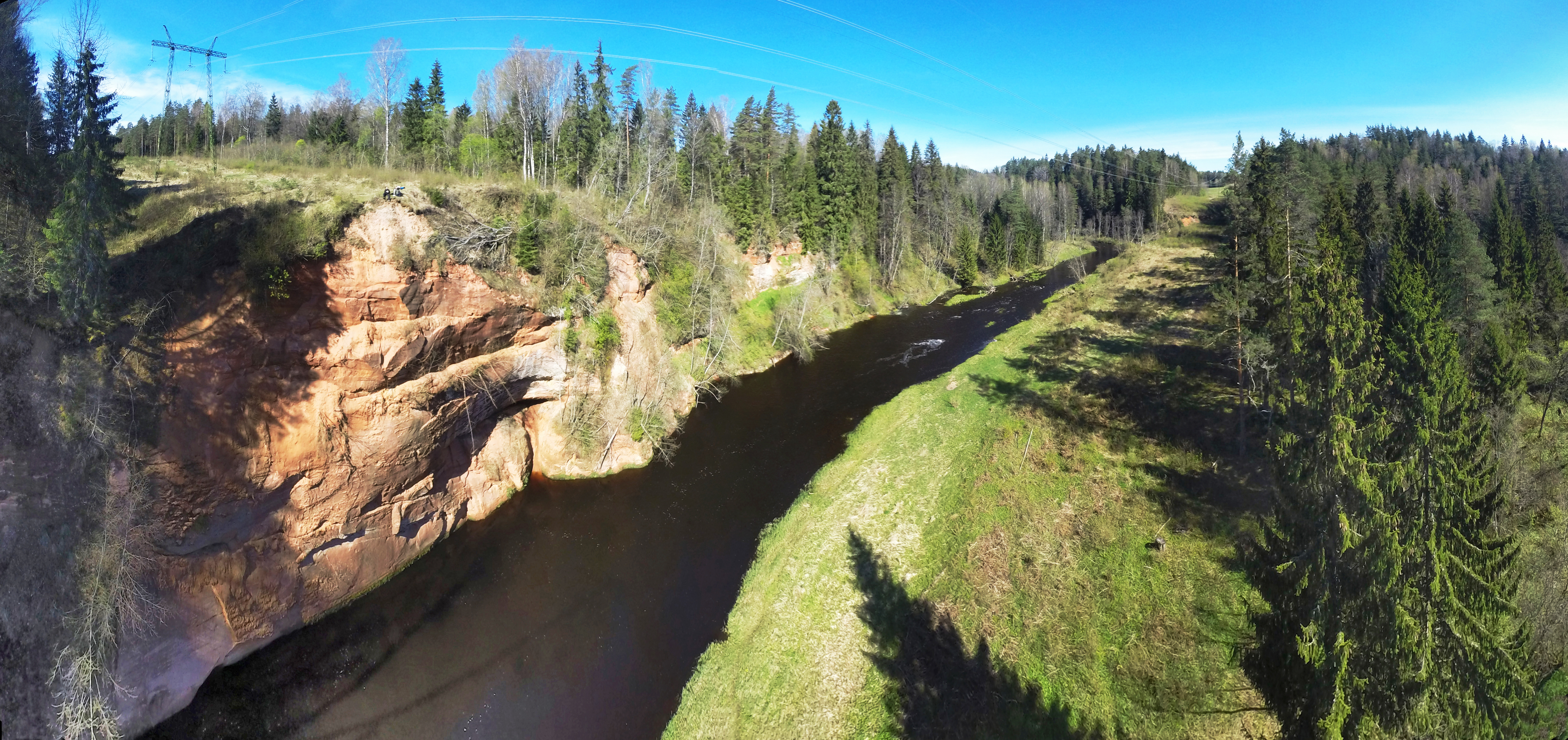 Jauka panorāma uz Slūnu iezi!!!